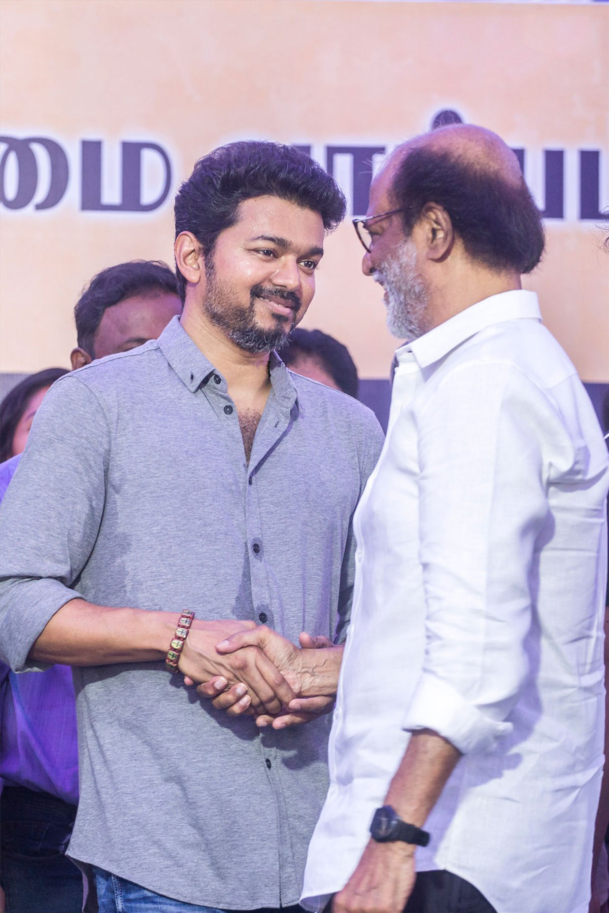 Rajinikanth and Vijay at the Nadigar Sangam Protest